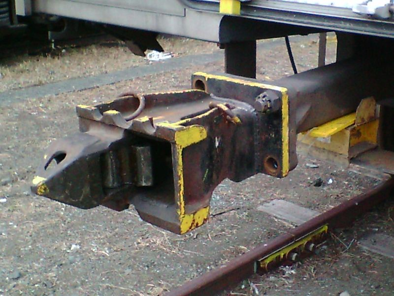 半永久連結器用アダプター